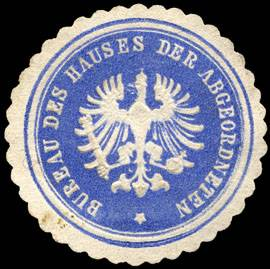 Sealing stamp Title: Bureau des Hauses der Abgeordneten Description: blau, weiß, geprägt Place: Berlin size: 3 cm